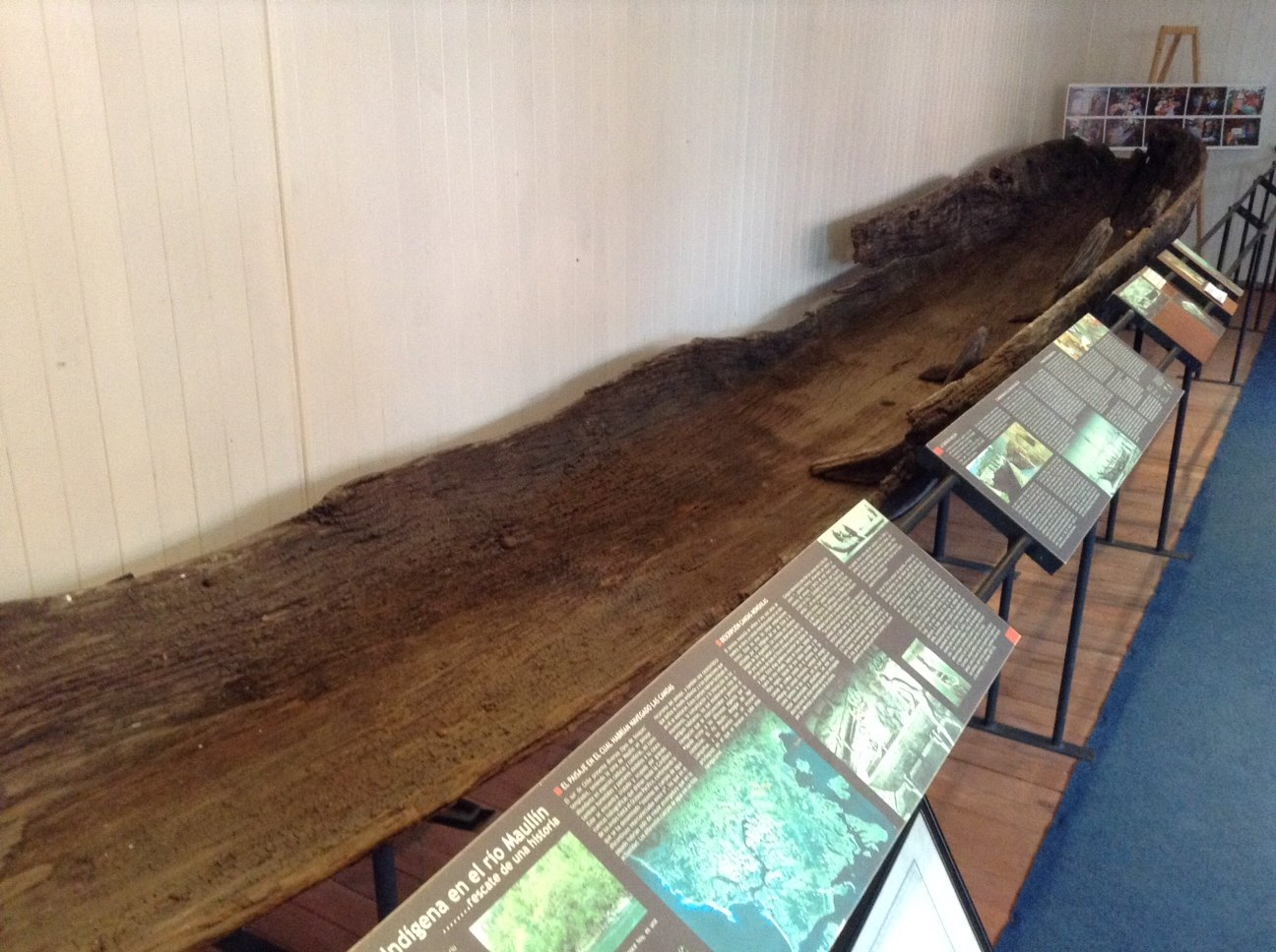 Wampo (Piragua) en Museo de Maullín